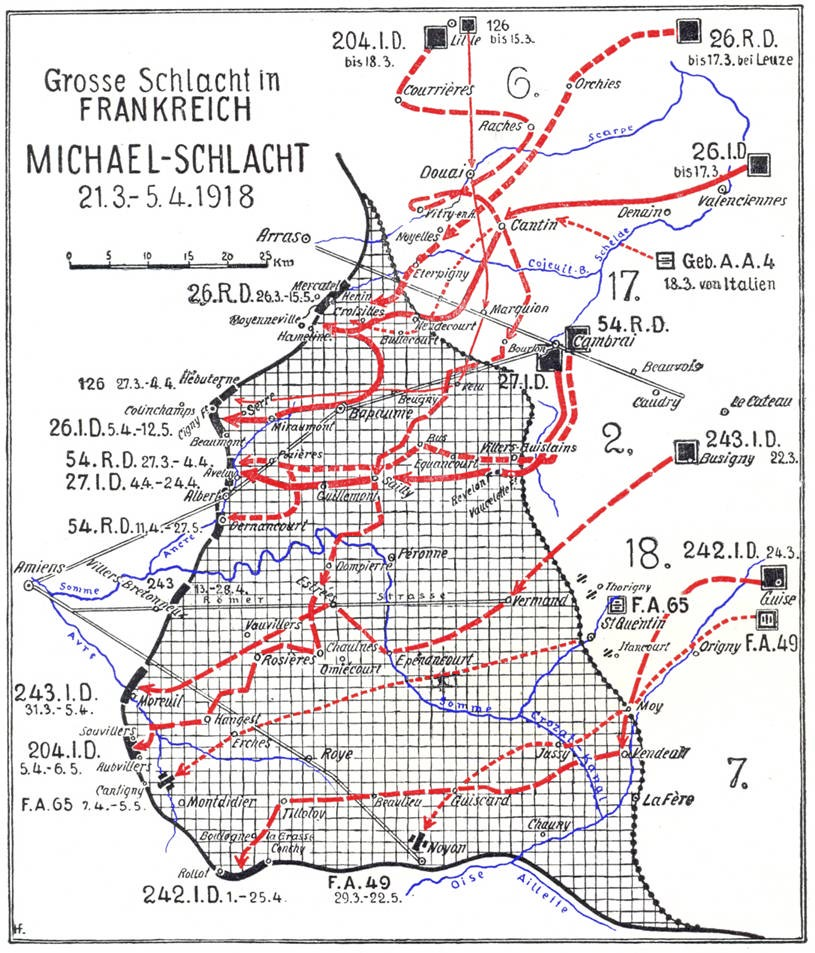 Karte: Operation Michael innerhalb der deutschen Frühjahrsoffensive 1918